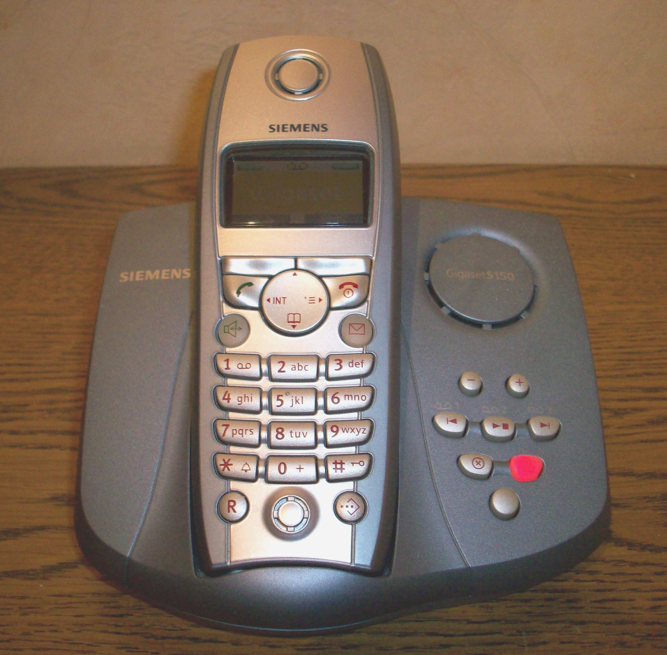 Siemens GIGASET S150 See also / siehe auch Image:Siemens GIGASET S150 08.jpg